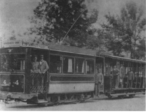 Der erste Straßenbahn BBC der Societe Anonyme des Tramways electriques de Sofia in Knjaschewo im Jahr 1901